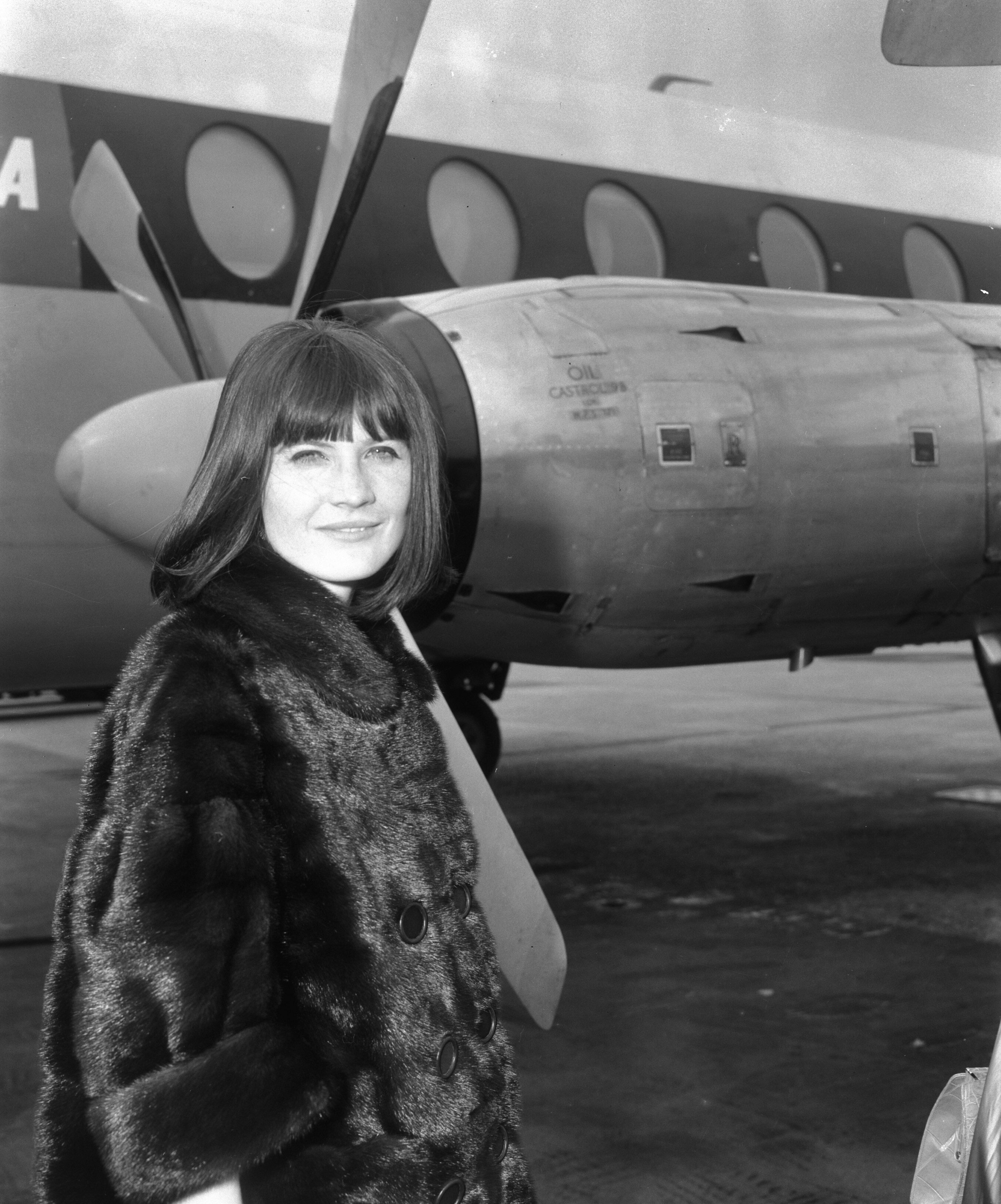 Collectie / Archief : Fotocollectie Anefo Reportage / Serie : [ onbekend ] Beschrijving : Aankomst Sandie Shaw (zangeres) op Schiphol Datum : 21 mei 1965 Locatie : Noord-Holland, Schiphol Trefwoorden : aankomsten, zangeressen Persoonsnaam : Shaw, Sandie Fotograaf : Bilsen, Joop van / Anefo Auteursrechthebbende : Nationaal Archief Materiaalsoort : Negatief (zwart/wit) Nummer archiefinventaris : bekijk toegang 2.24.01.04 Bestanddeelnummer : 917-7989